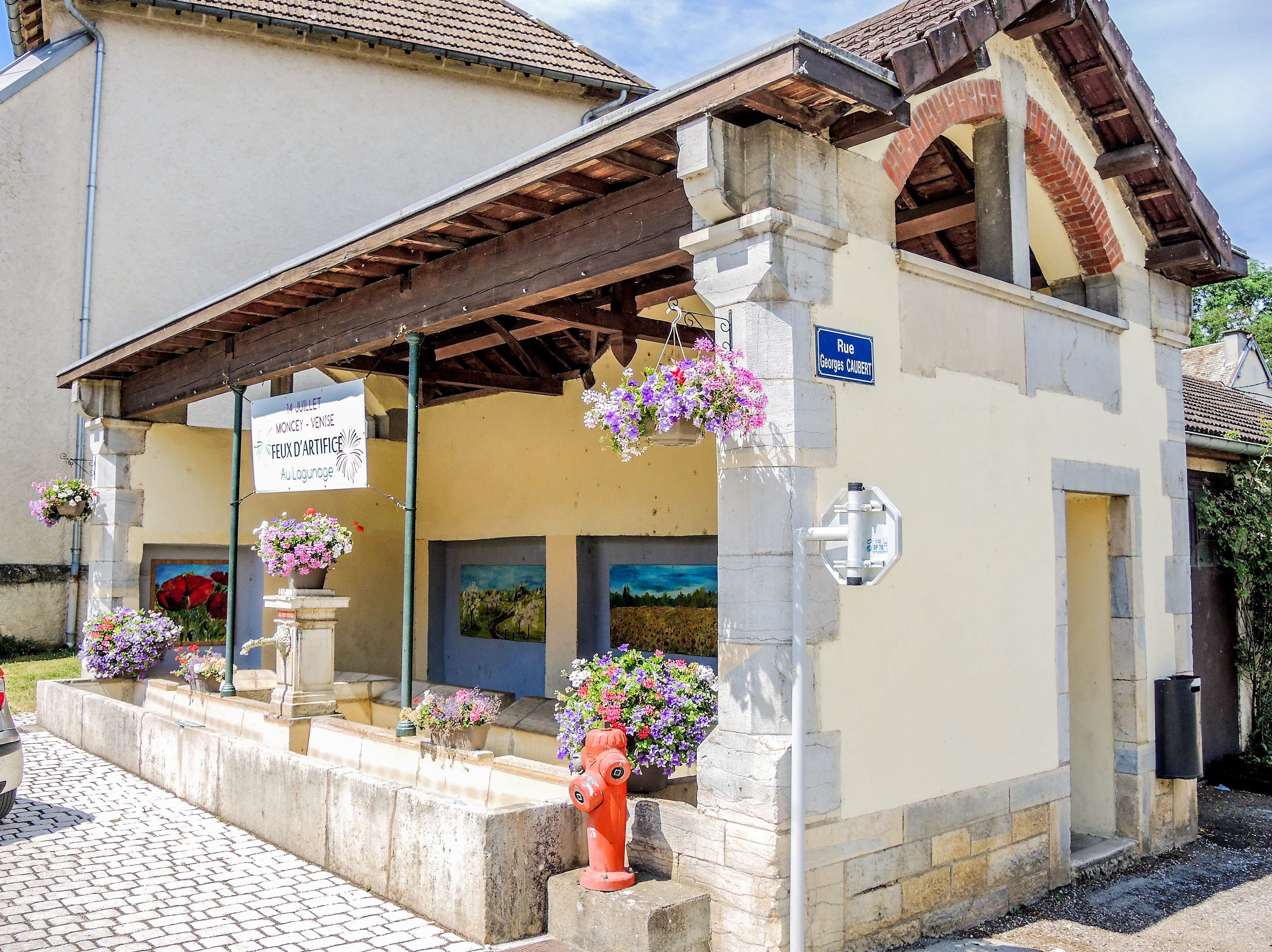 Fontaine-lavoir